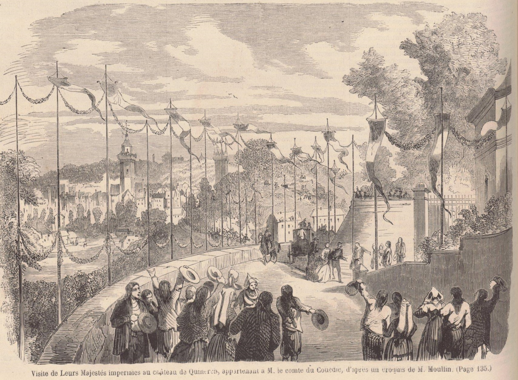 Visite de leurs Majestés impériales au château de Quimerch, appartenant à M. le comte du Couédic en août 1858